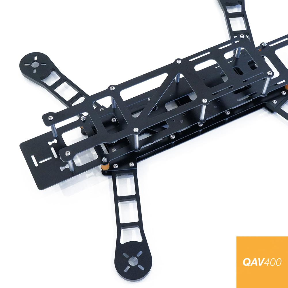 Le cadre du drone